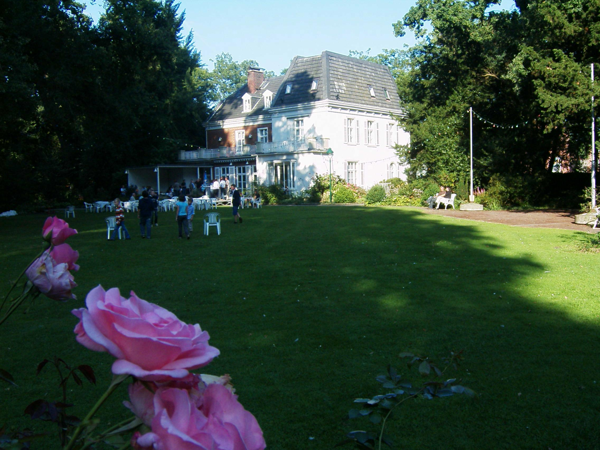 Begegnungszentrum „Villa Hecking“. Neuenkirchen (Kreis Steinfurt), öffentliches Begegnungszentrum mit Parkanlage